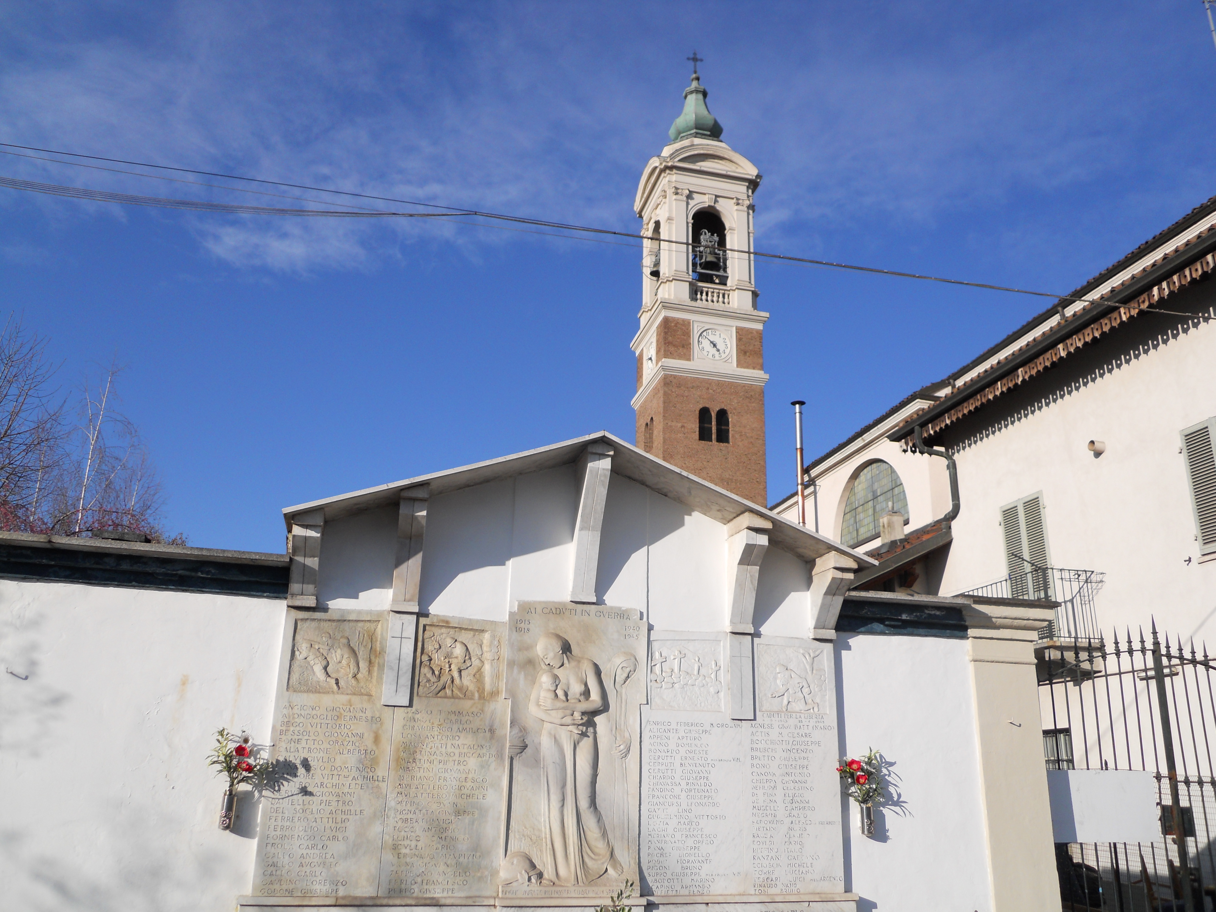 Torino, via Foglizzo: il campanile della Chiesa dei Santi Bernardo e Brigida